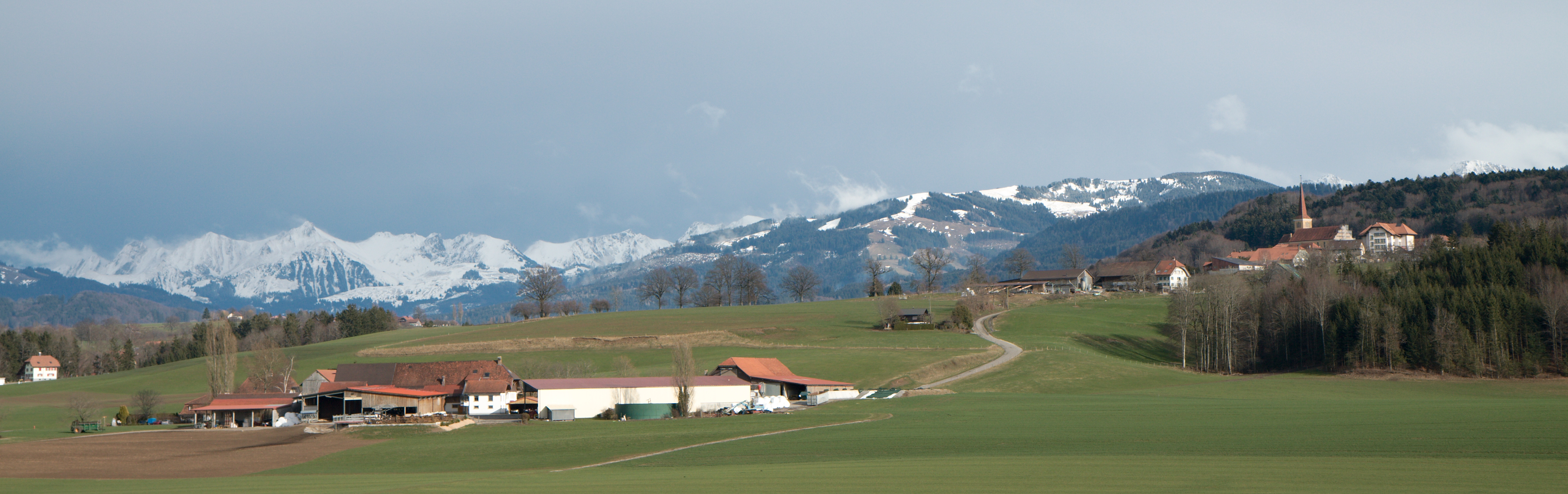 Hameau du Petit Ependes. Église et école d'Ependes à l'arrière-plan.